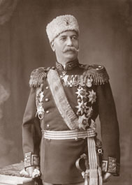 General Vasil Kutinchev